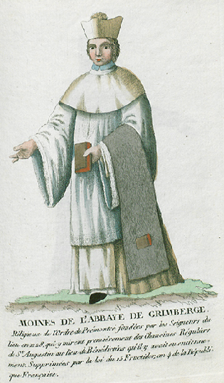 Collection de costumes de tous les ordres monastiques, supprimés à differentes époques, dans la ci-devant Belgique, Bruxelles, Philippe Joseph Maillart et sœur, 1811